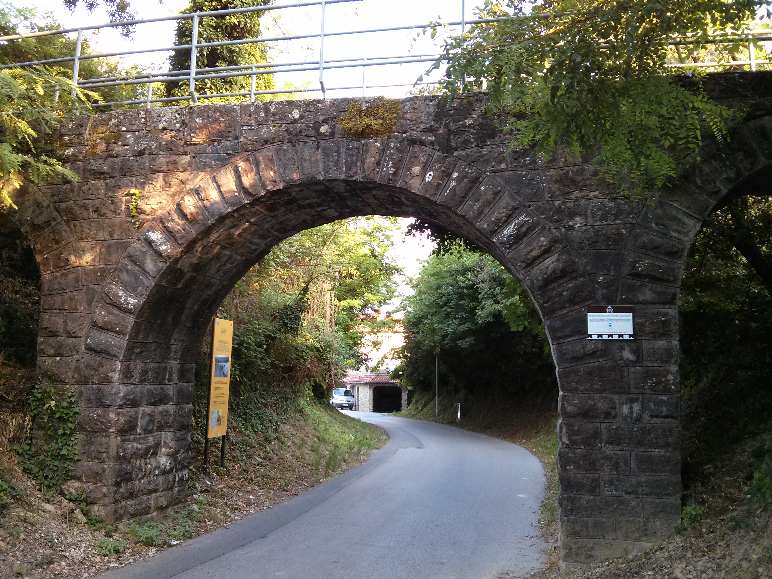 Prehod nad ozkotirno zeleznico